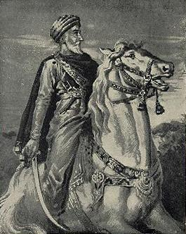 Engraving of Hassan-i-Sabah.